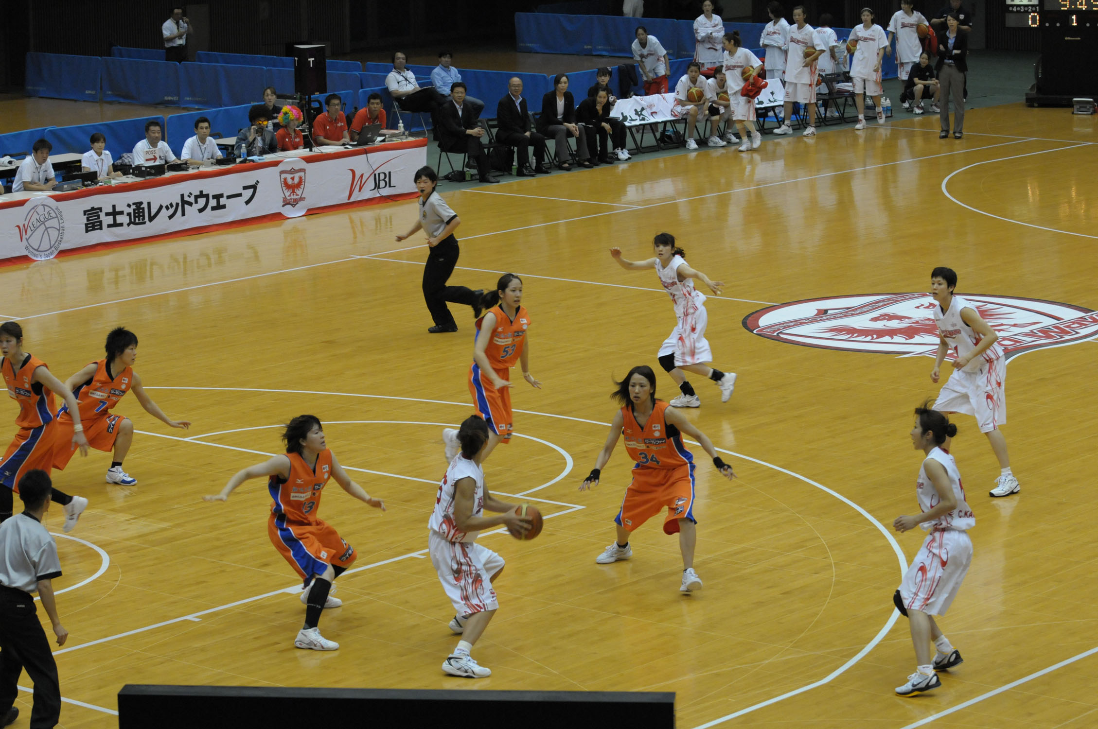 WJBL 11-12レギュラーリーグ、富士通対新潟。とどろきアリーナで。